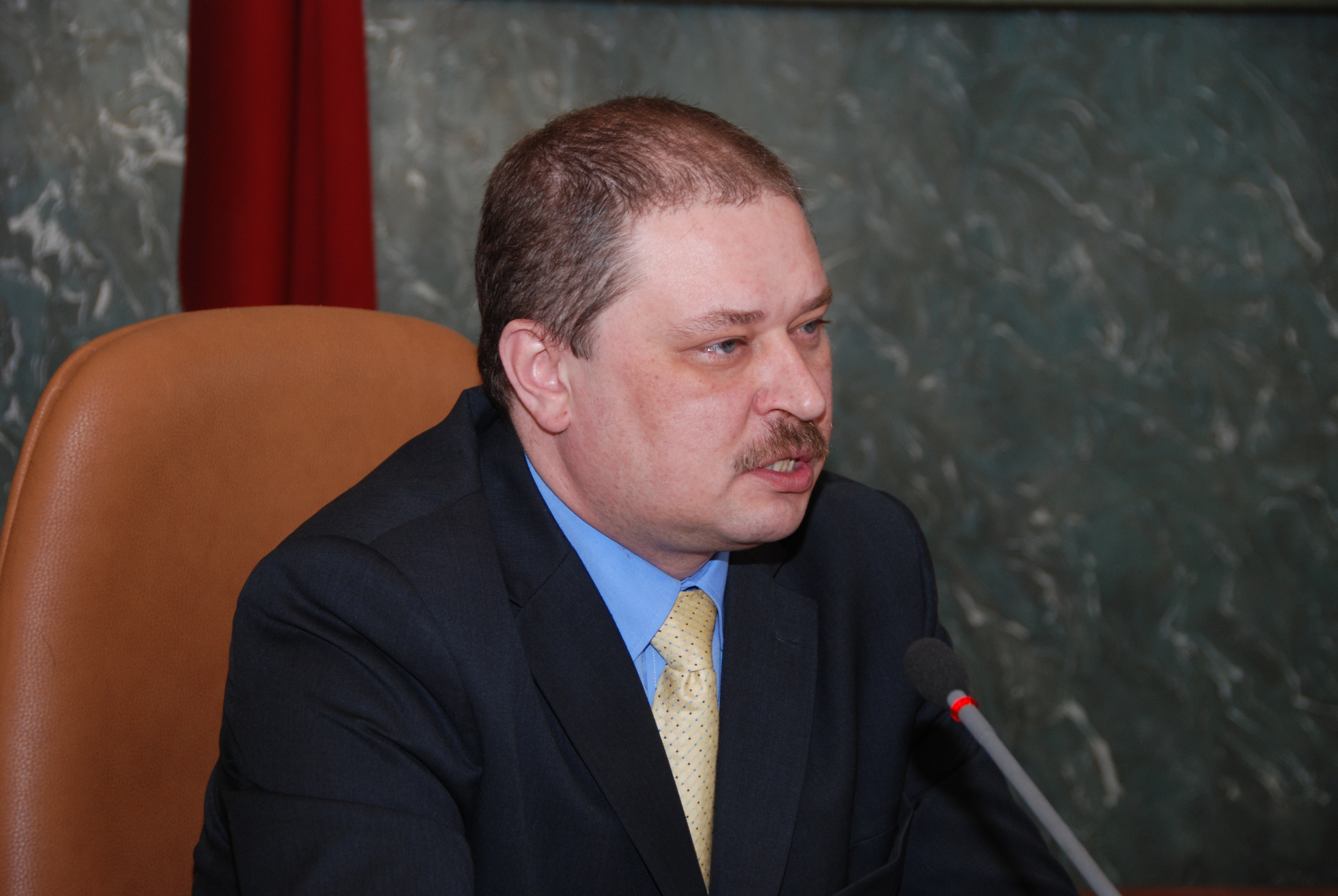 Izglītības un zinātnes ministrs Rolands Broks uzrunā starptautisko mācību priekšmetu olimpiāžu laureātus un viņu pedagogus, 2011.gada 17.februārī Foto: Aivis Freidenfelds, Valsts kanceleja